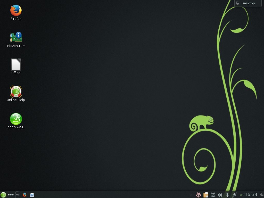 openSUSE13.1 mit Desktop von KDE 4.11.2